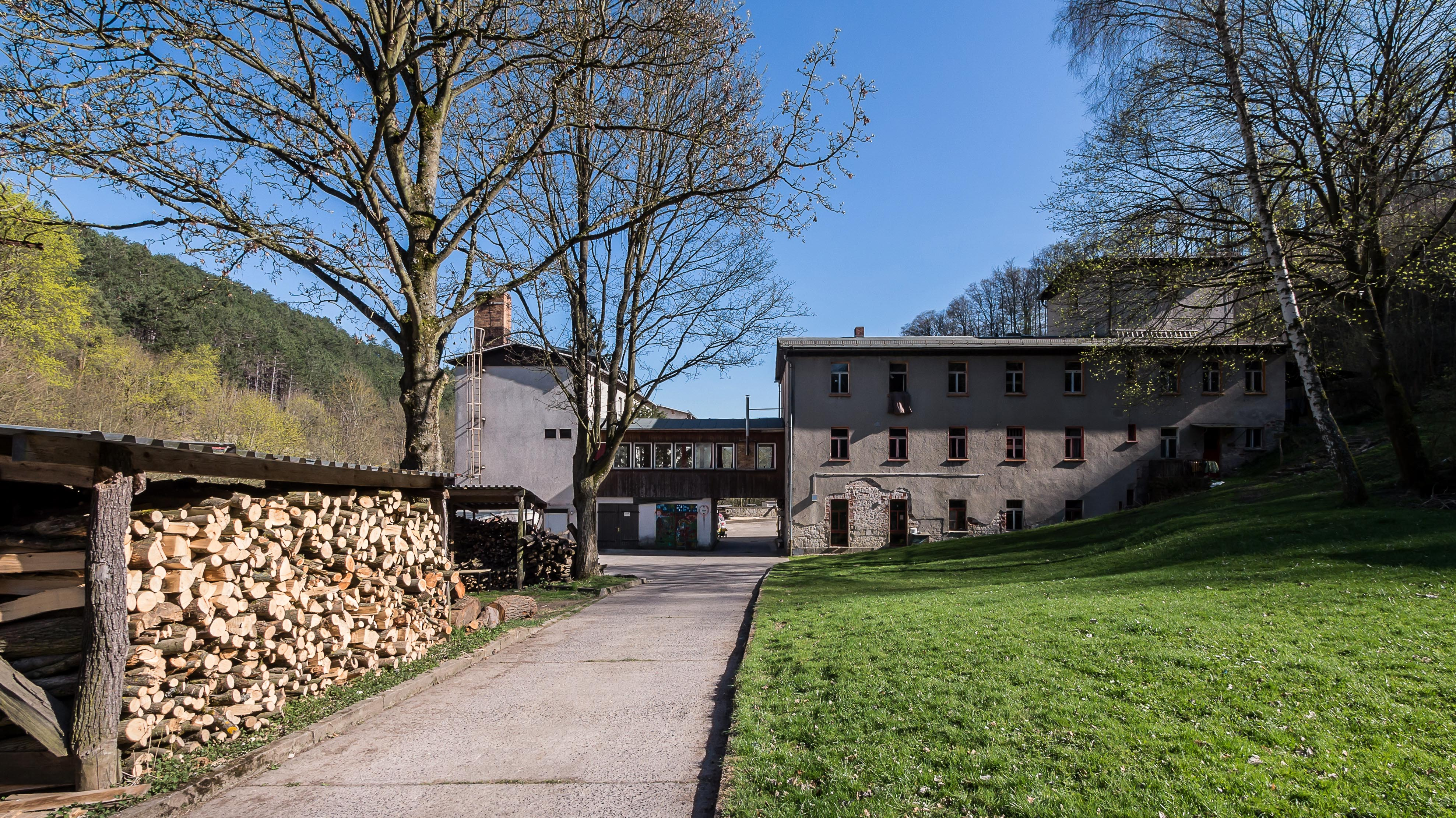 Pfarrkeßlar rechts das ehemalige Pfarrhaus und die Reste des Turms